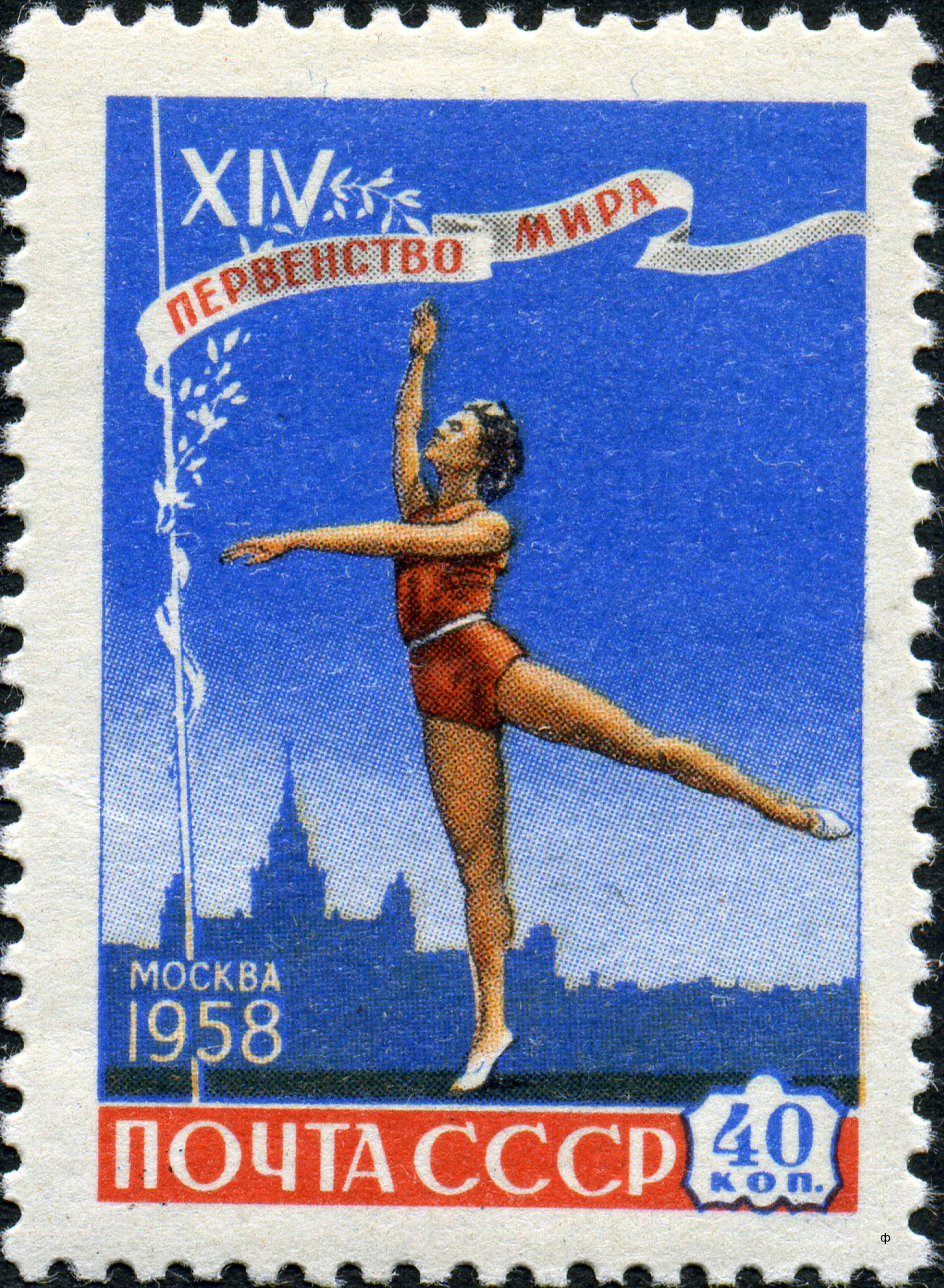 Почтовая марка СССР, выпущенная в июне 1958 года и посвящённая XIV чемпионату мира по гимнастике, проводившемуся в Москве. Художник — Р. Житков, номер по каталогу ЦФА — 2168, тираж — 1,5 млн экз. Марка иллюстрирует соревнования по художественной гимнастике. На ней изображена спортсменка и и здание Московского государственного университета. Образ спортсменки создан на основе фотографии Ларисы Латыниной, сделанной Н. Козловским и опубликованной в журнале «Огонёк», 1957 год, №38, 1-я страница обложки (источник — брошюра Николая Кочеткова «О чём умолчали каталоги», Москва, ИТЦ «Марка», 2006 год, стр. 41).